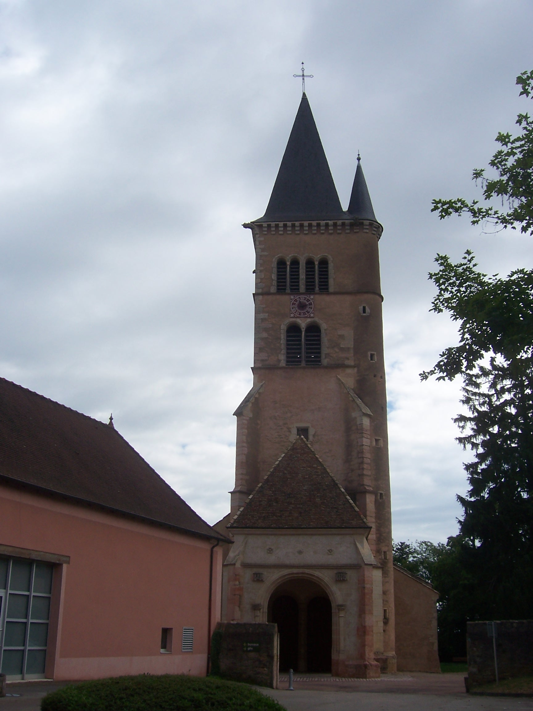 Eglise de Cuisery